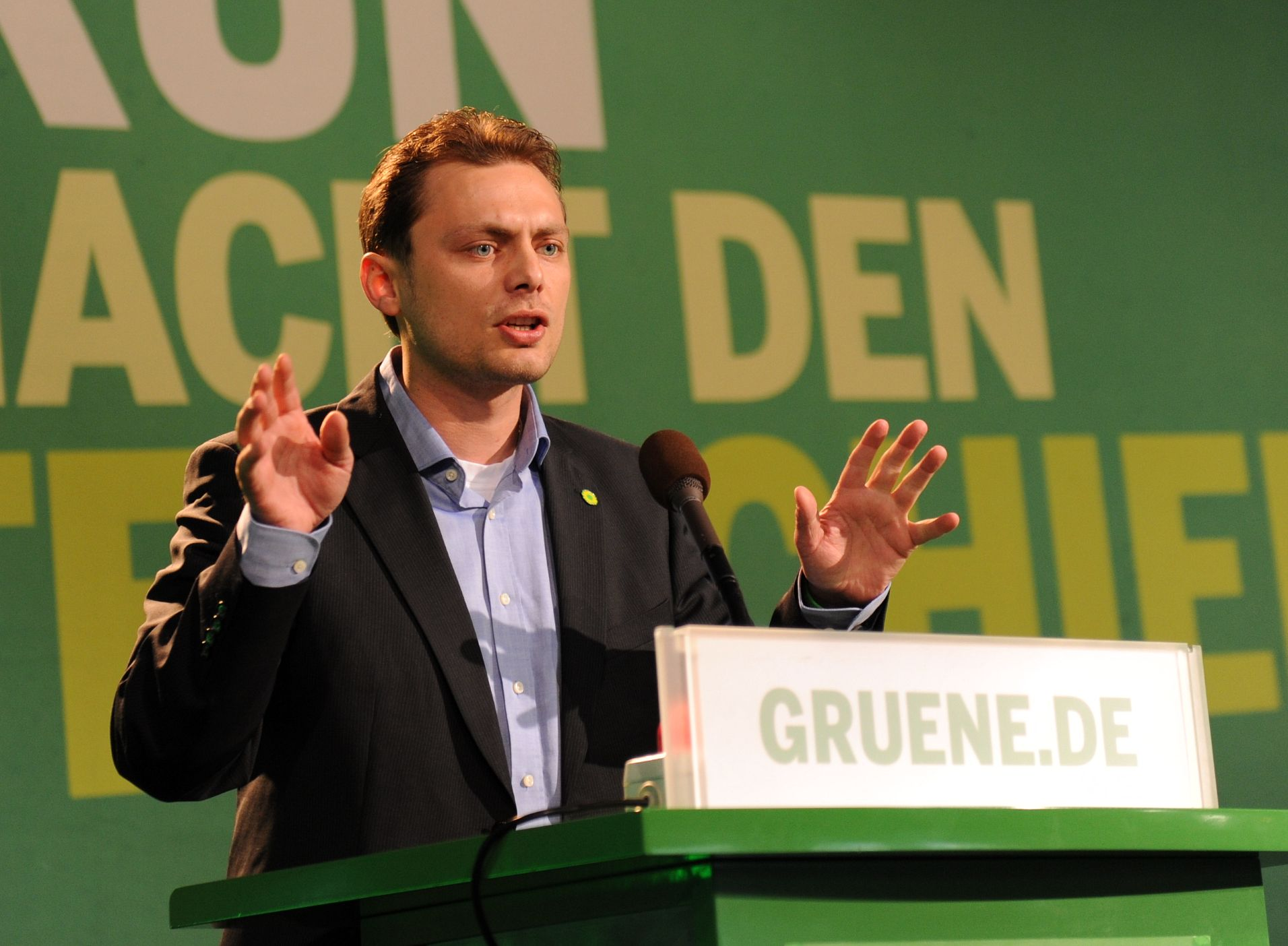 Daniel Köbler, Sprecher von Bündnis 90/Die Grünen in Rheinland Pfalz und Spitzenkandidat für die Landtagswahl 2011, bei der Tagung des grünen Länderrats in der Alten Lokhalle Mainz